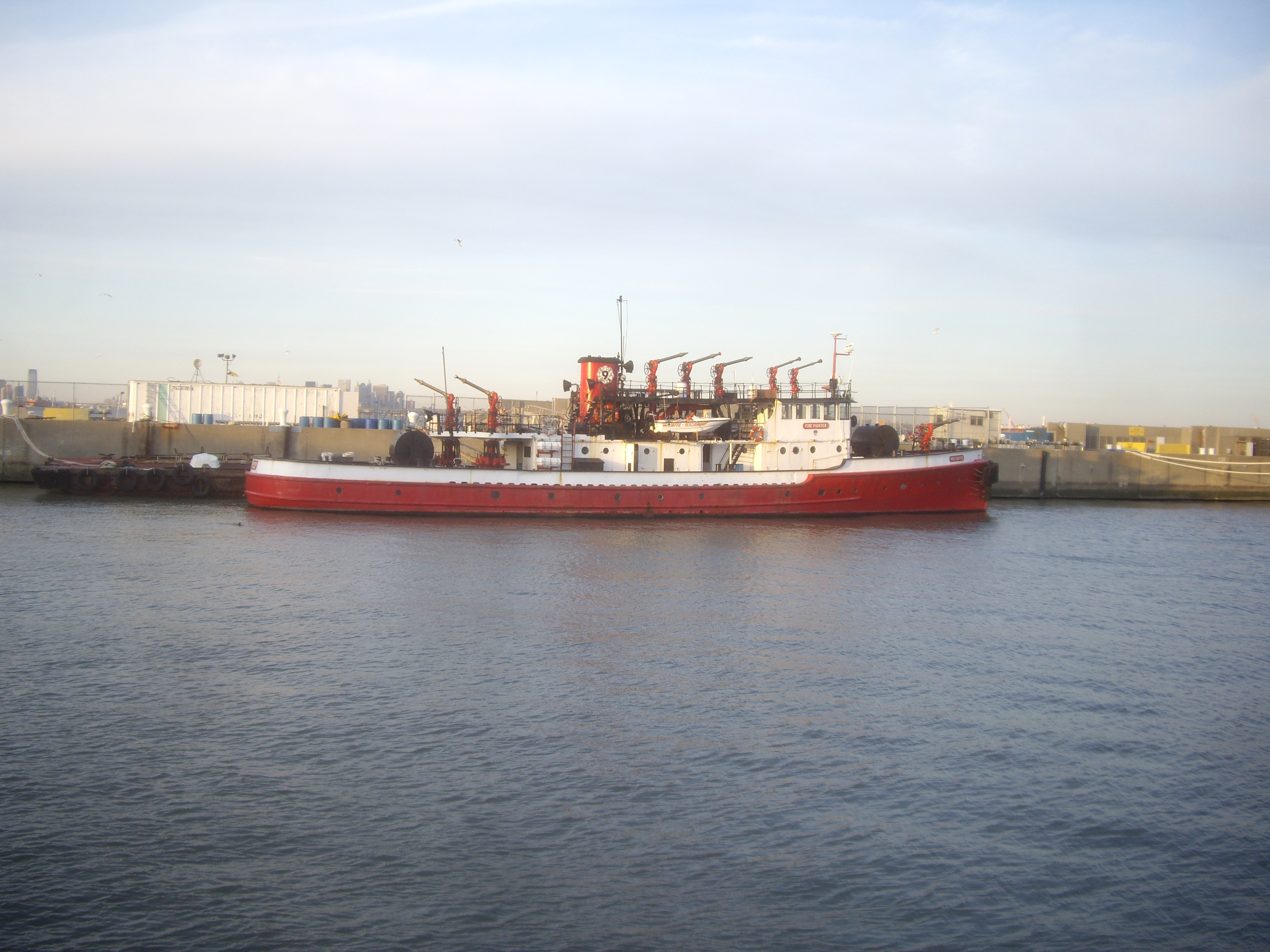 Fire Fighter NHL